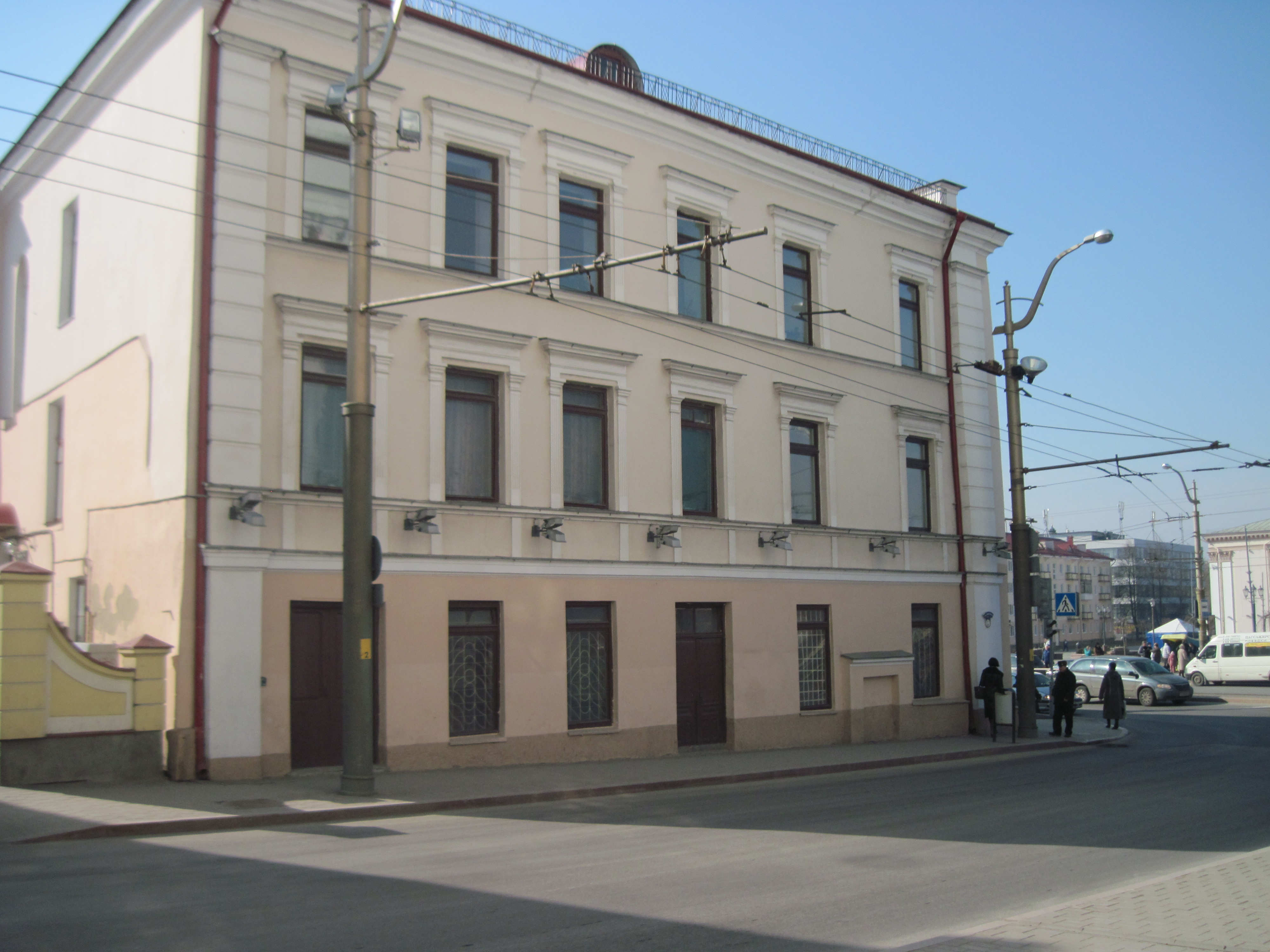 Беларуская (тарашкевіца): Былы палац Сапегаў у Гродне (вул. К. Маркса, 1). Выгляд з боку касцела-вул. К. Маркса